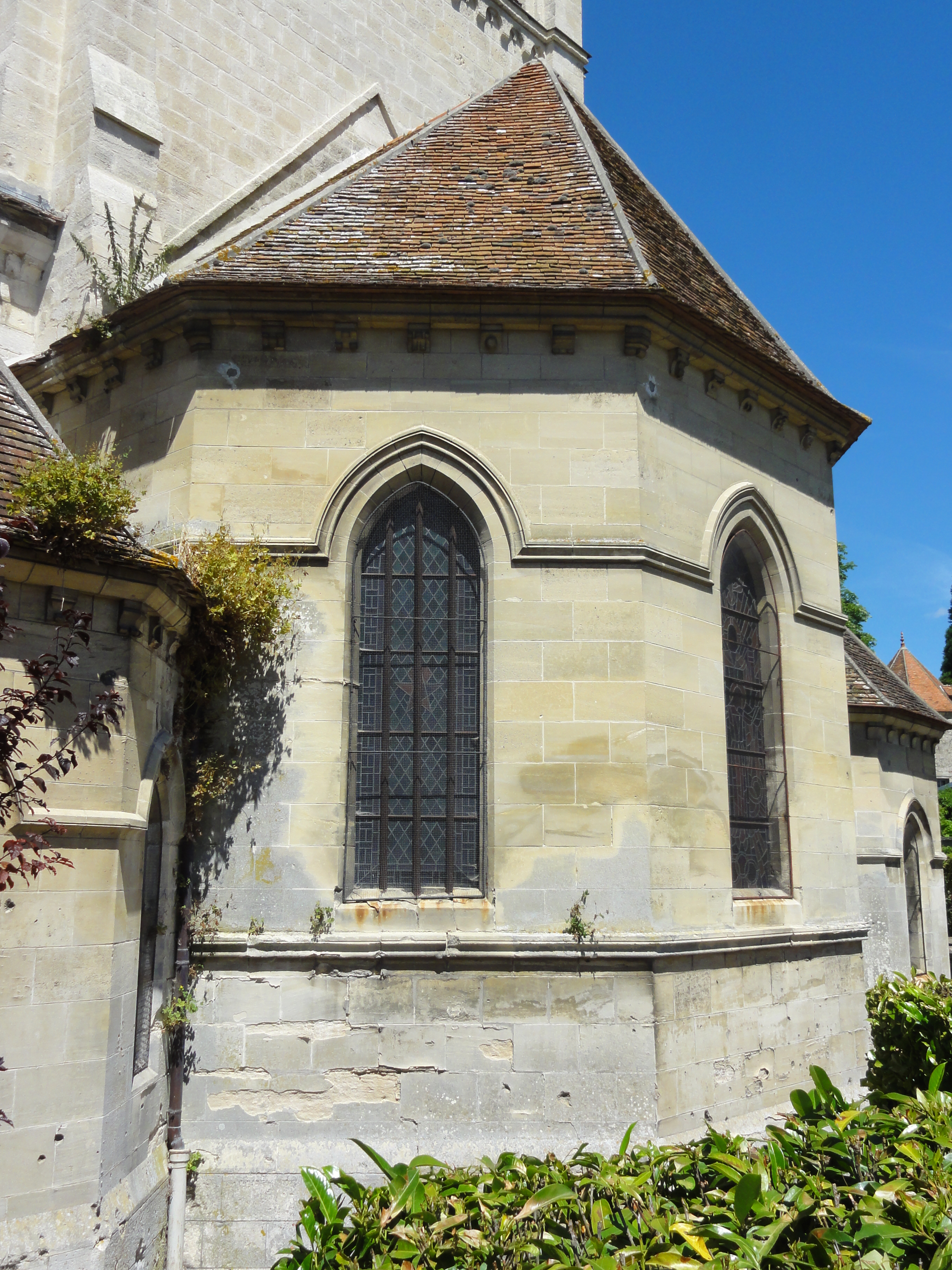 Abside.